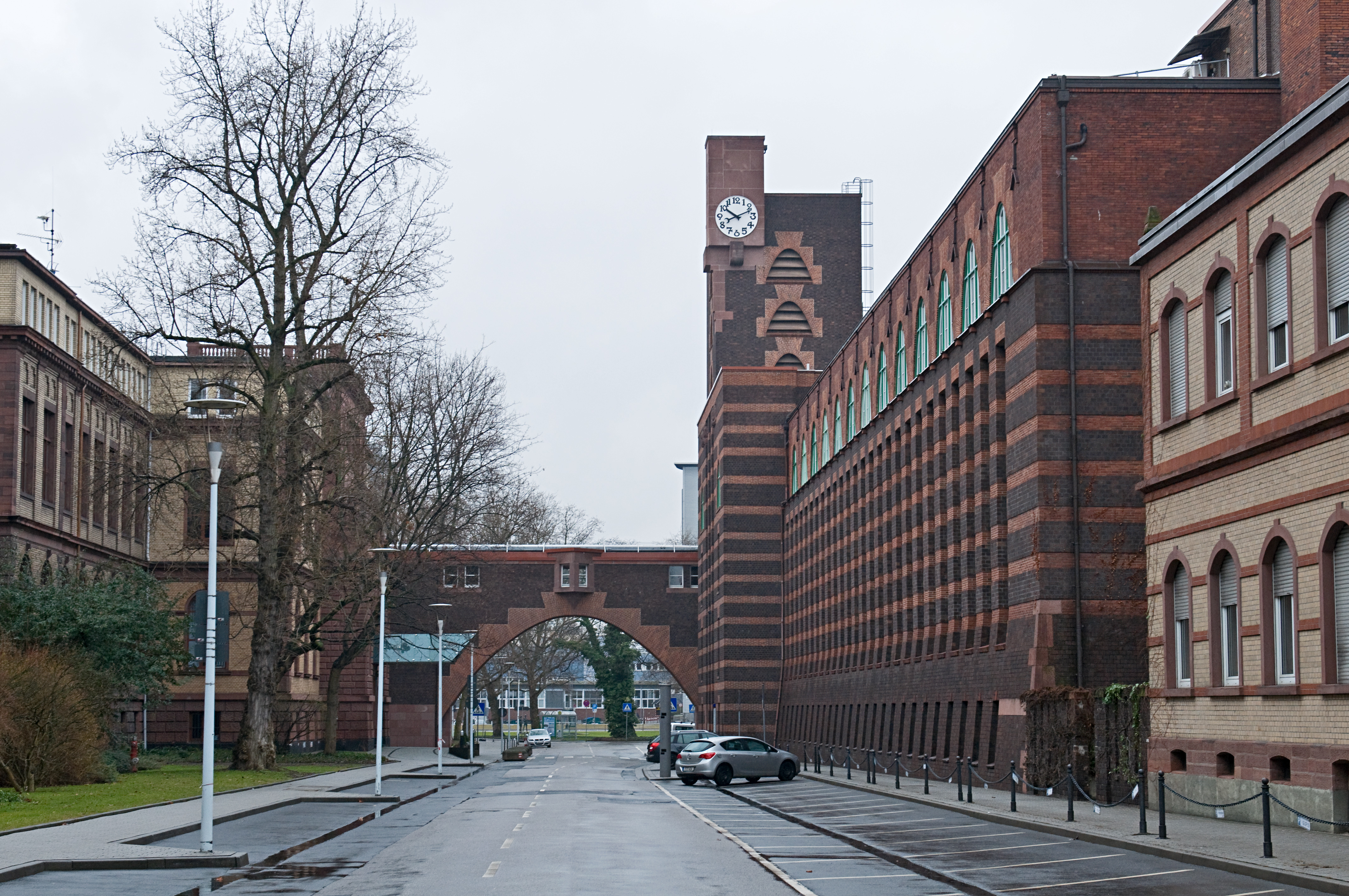 Industriepark Höchst Blick von Osten in die Brüningstraße entlang des Behrensbaus auf Brücke und Turm